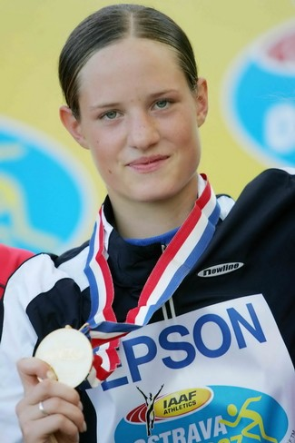 česká atletka Kateřina Cachová